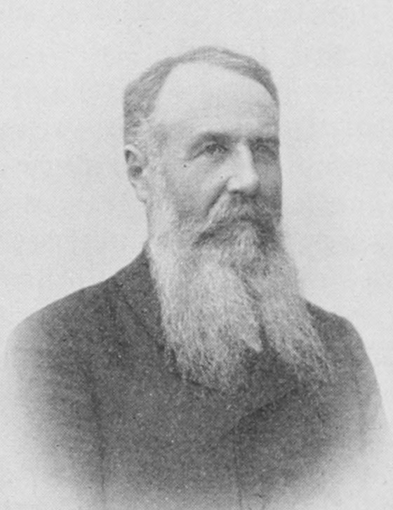 Nikola Pašić, político, primer ministro de Serbia y de Yugoslavia.